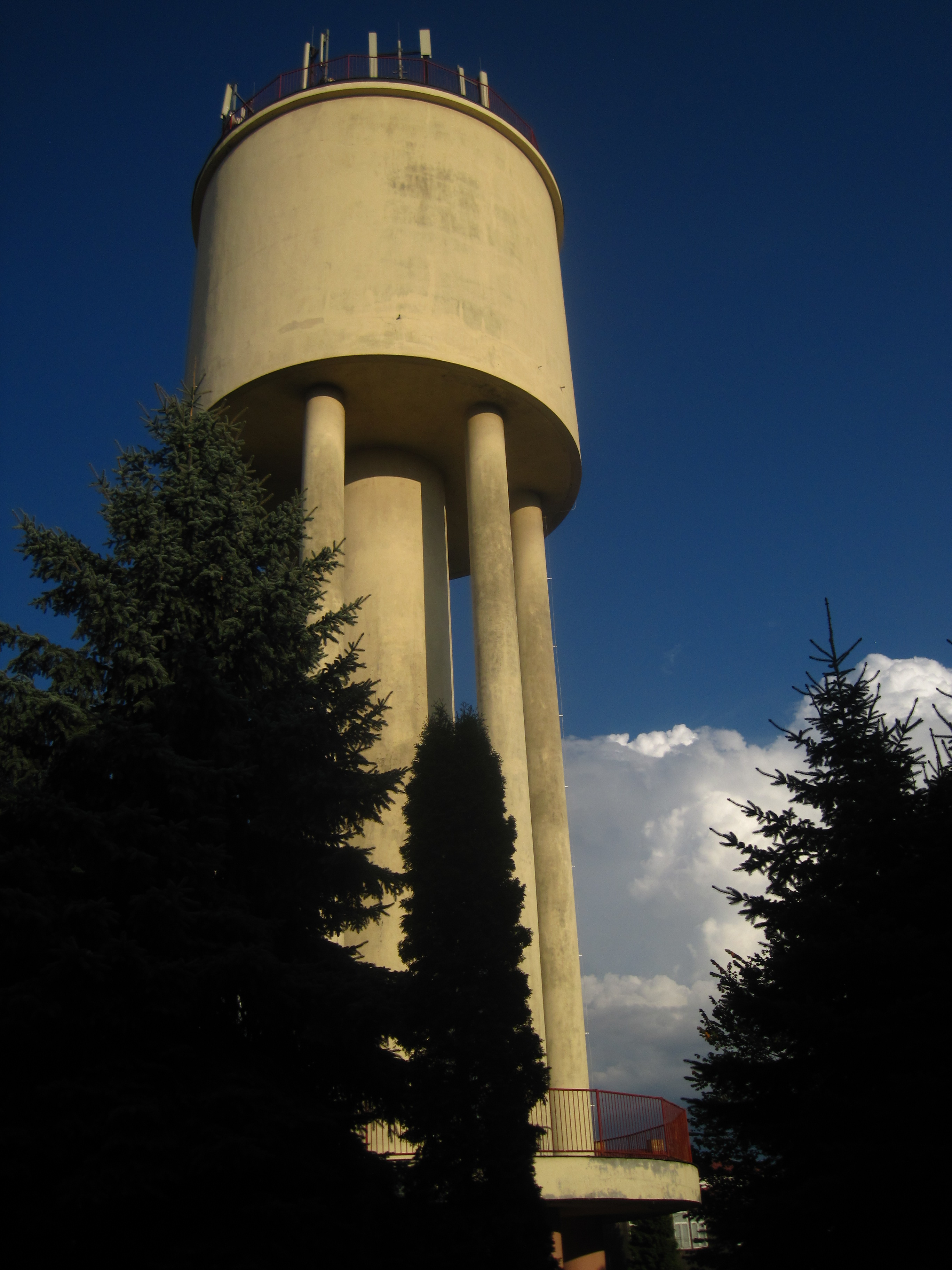 Vodojem, J. A. Komenského, Pečky.